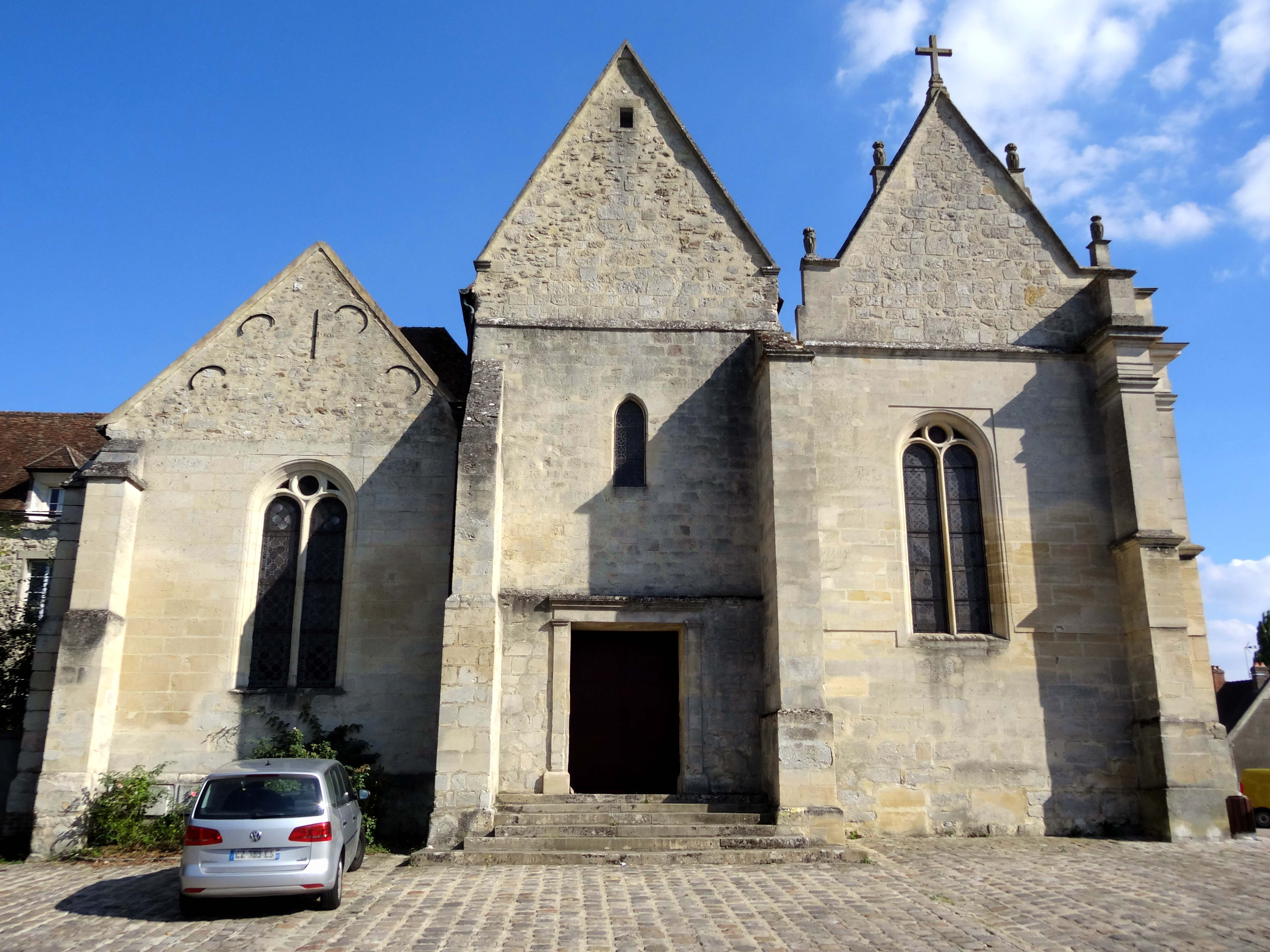 Église Saint-Rémi de Marines - voir titre.